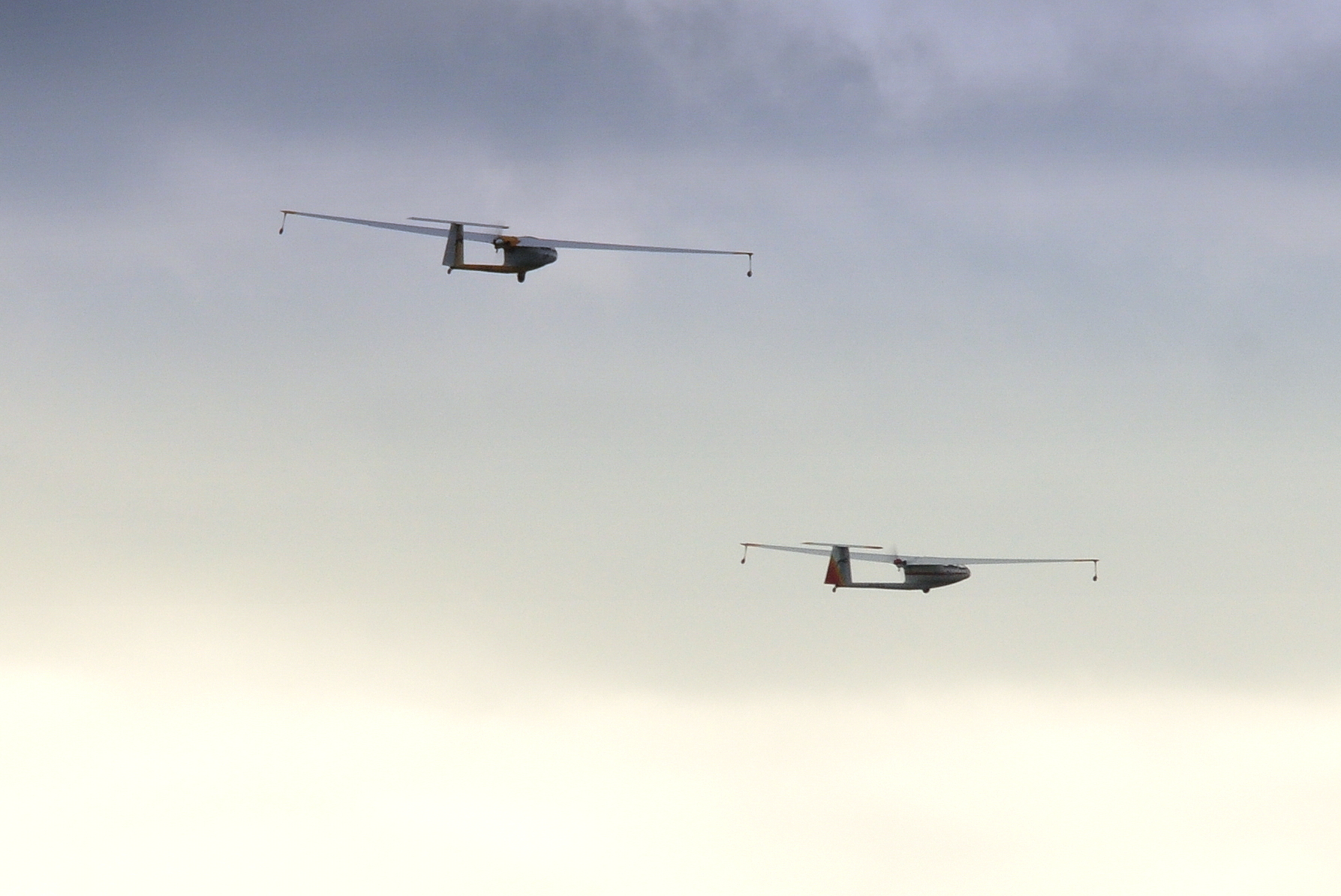 Motoszybowce Ogar